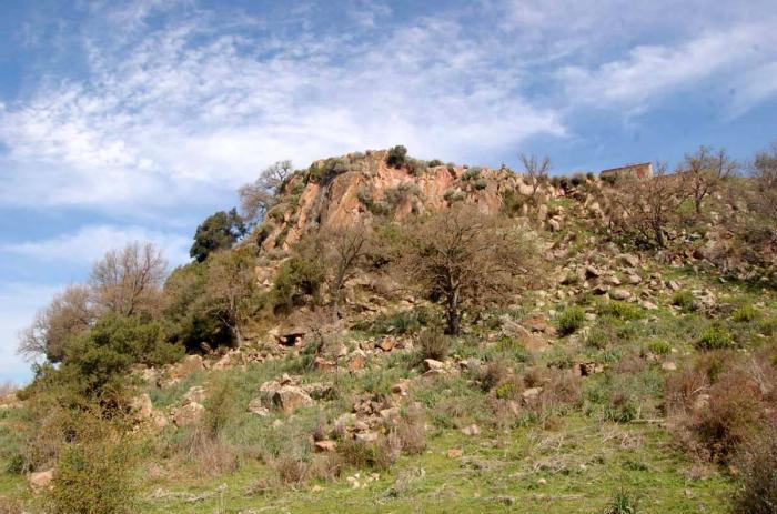 Necropoli di Sos Furrighesos (Anela)